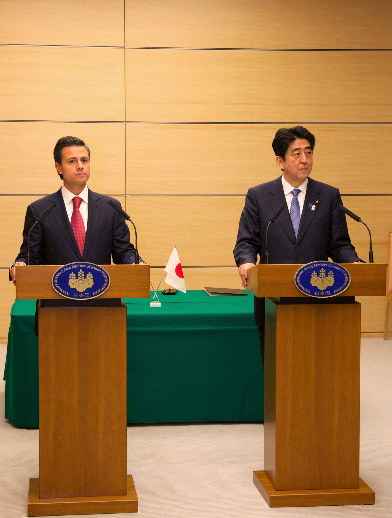 Reunión del Sr. Presidente de los Estados Unidos Mexicanos con el Excmo. Sr. Shinzō Abe, Primer Ministro de Japón. Tokyo, Japón. 8 de abril de 2013.